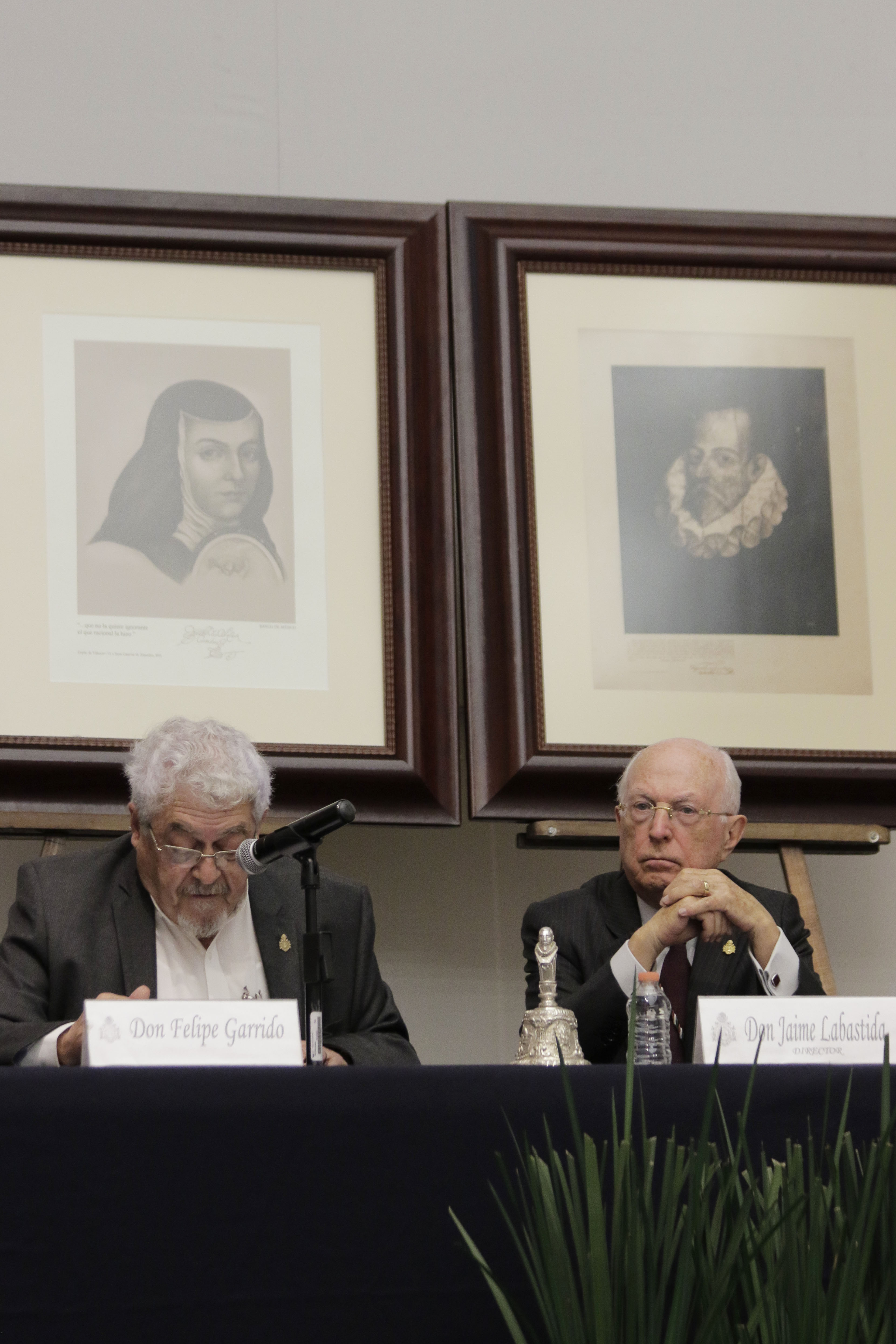 Viernes 25 de mayo de 2018. En el Foro Polivalente de la Biblioteca de México, se rindió homenaje al ensayista, crítico, historiador, editor, académico, promotor cultural y diplomático José Luis Martínez Rodríguez, con motivo del Centenario de su nacimiento. Participarán sus colegas de la Academia Mexicana de la Lengua: Felipe Garrido, Adolfo Castañón y Ascensión Hernández Triviño, Jaime Labastida y Vicente Quirarte. Fotografía: Tania Victoria / Secretaría de Cultura CDMX.